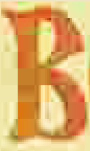 Журнал "Мир искусства"